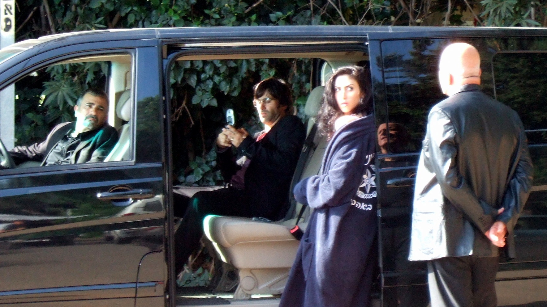 הילה סעדה בסט הבורר